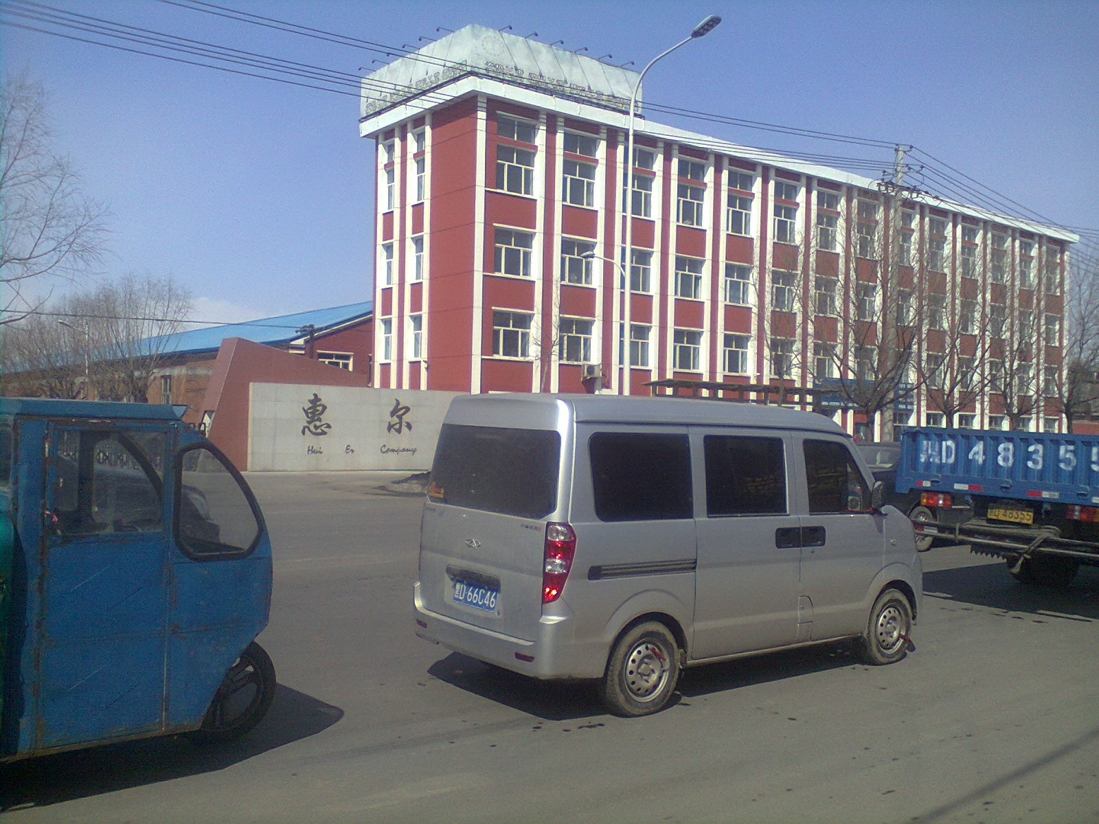 佳木斯惠尔公司